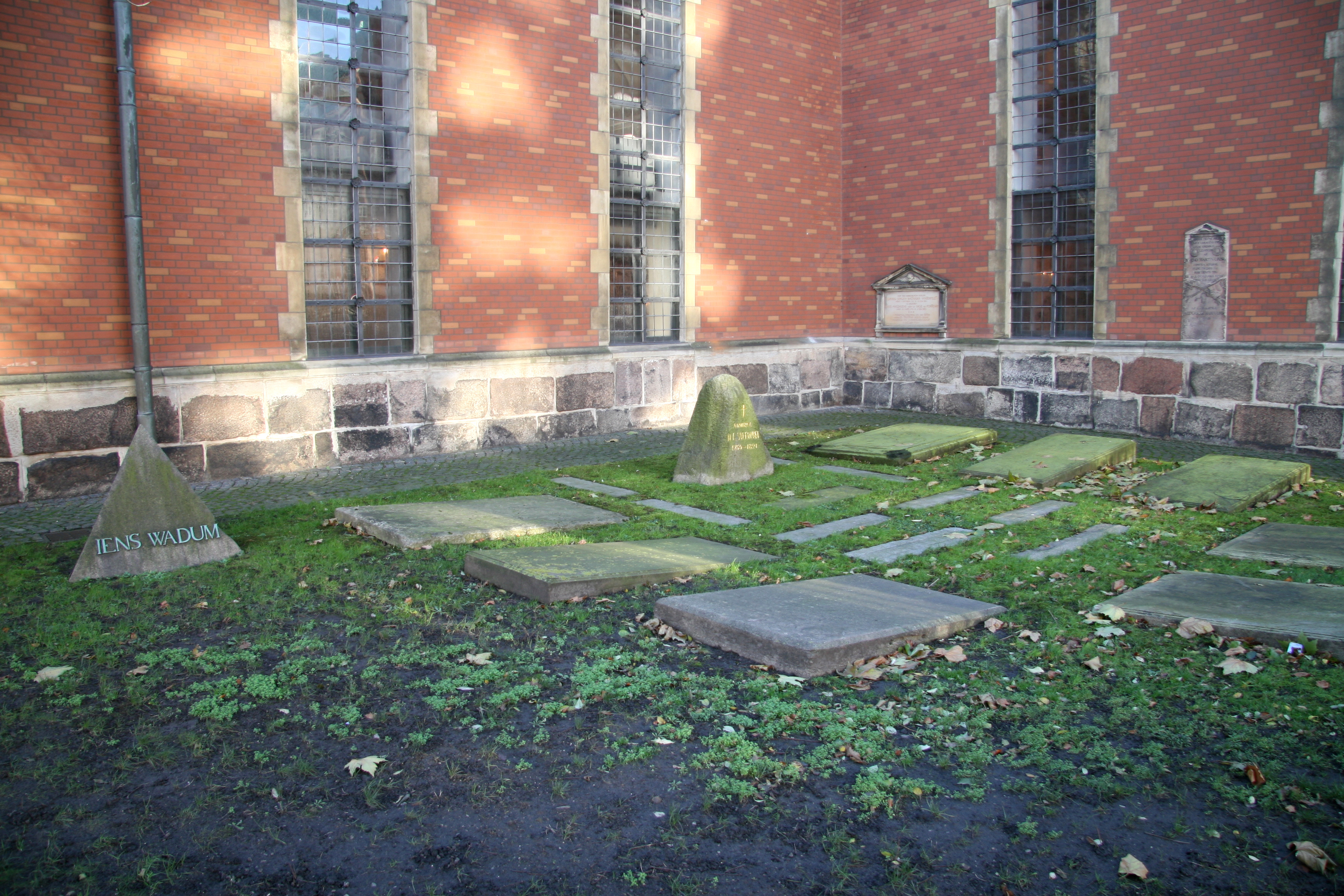 Holmens Kirke, Copenhagen, Denmark . Gravsten i lille urtegård.